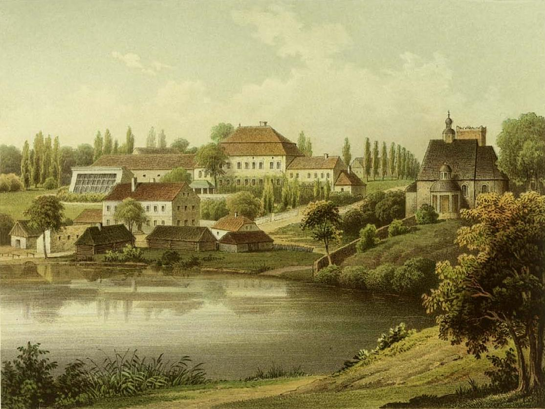 Schloss Kamienietz (polnisch Kamieniec) im Landkreis Tost-Gleiwitz